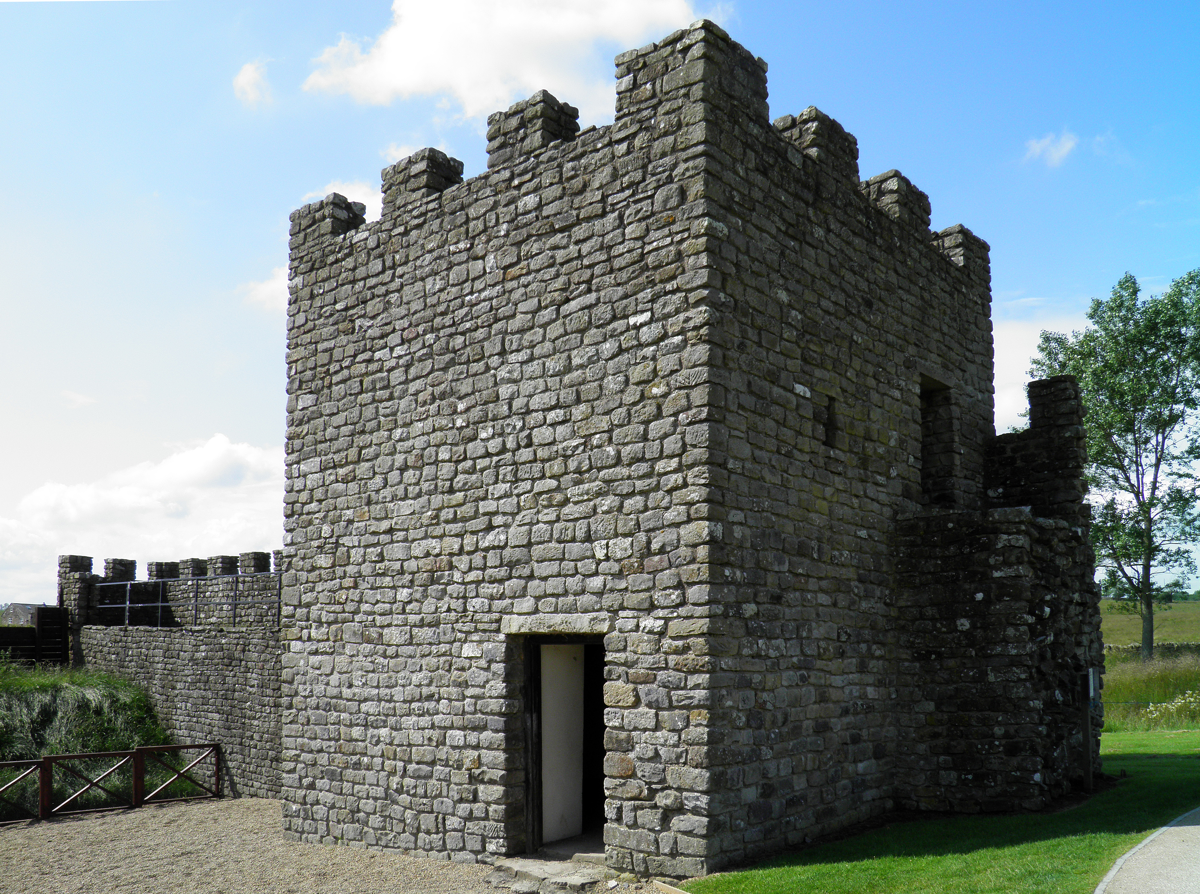 Vindolanda fort, UK